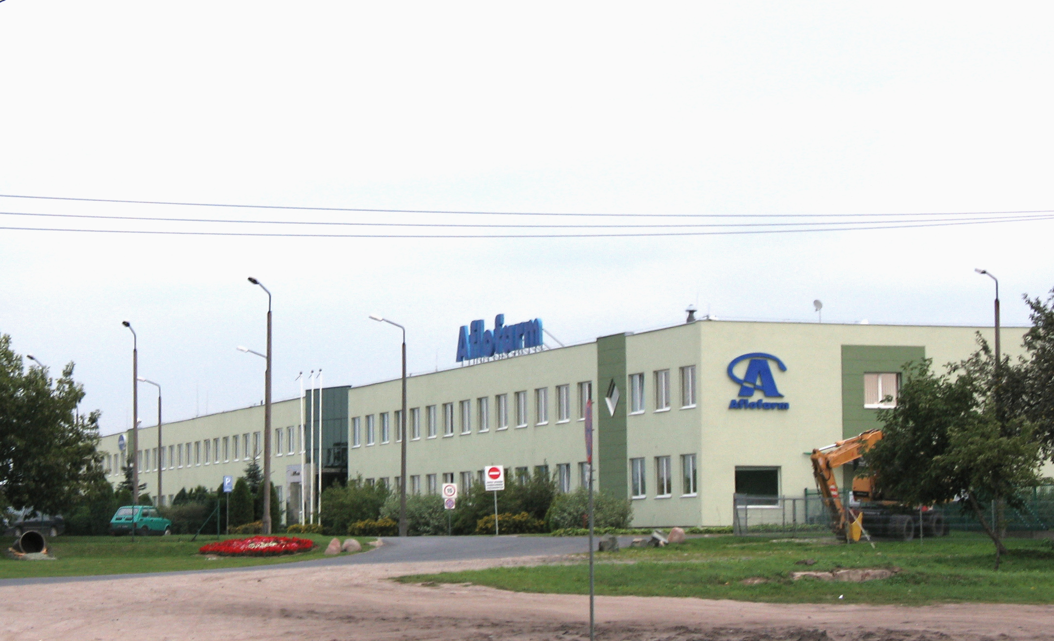 Pabianice, ul. Partyzancka 133 - Fabryka Leków Aflofarm